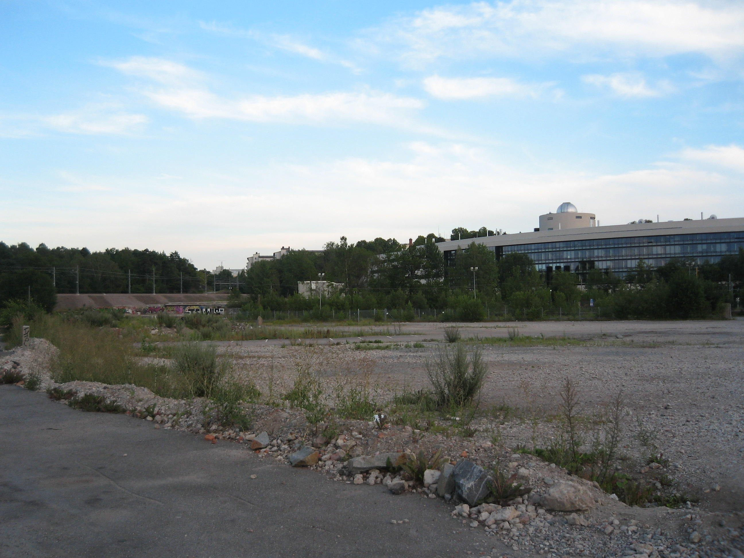 Albano industrial area, Stockholm